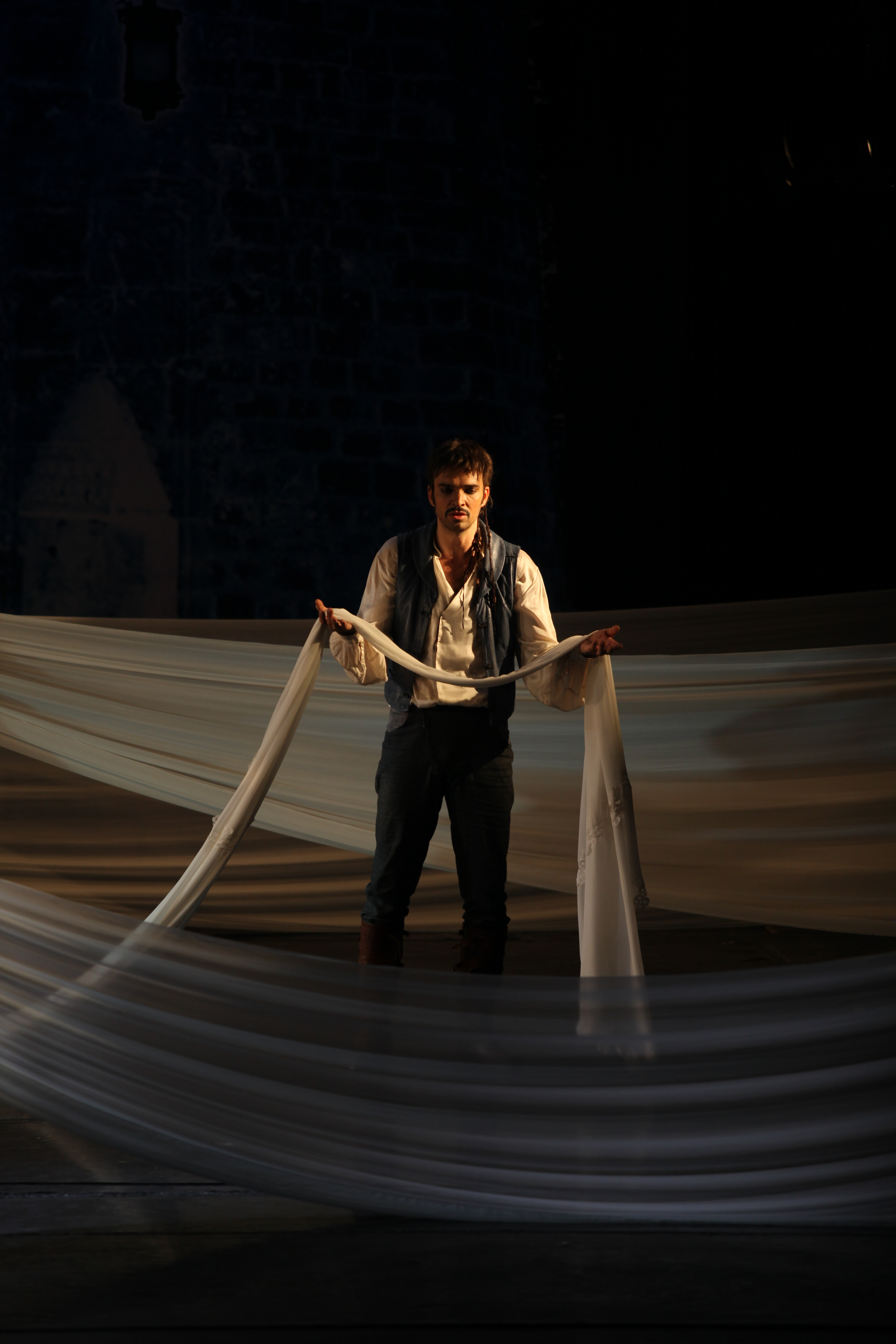 Premijera predstave "Zona Zamfirova"